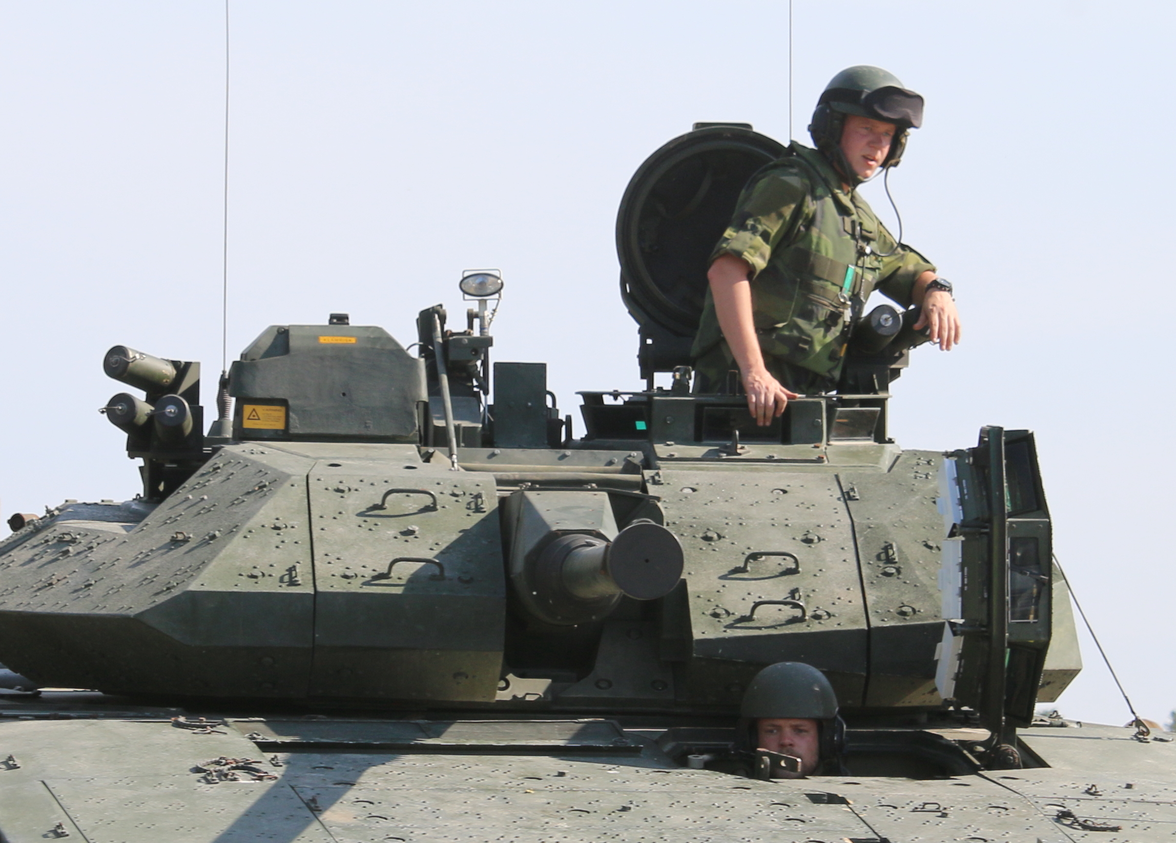 Stridsfordon 9040 Revinge 2015 närbild